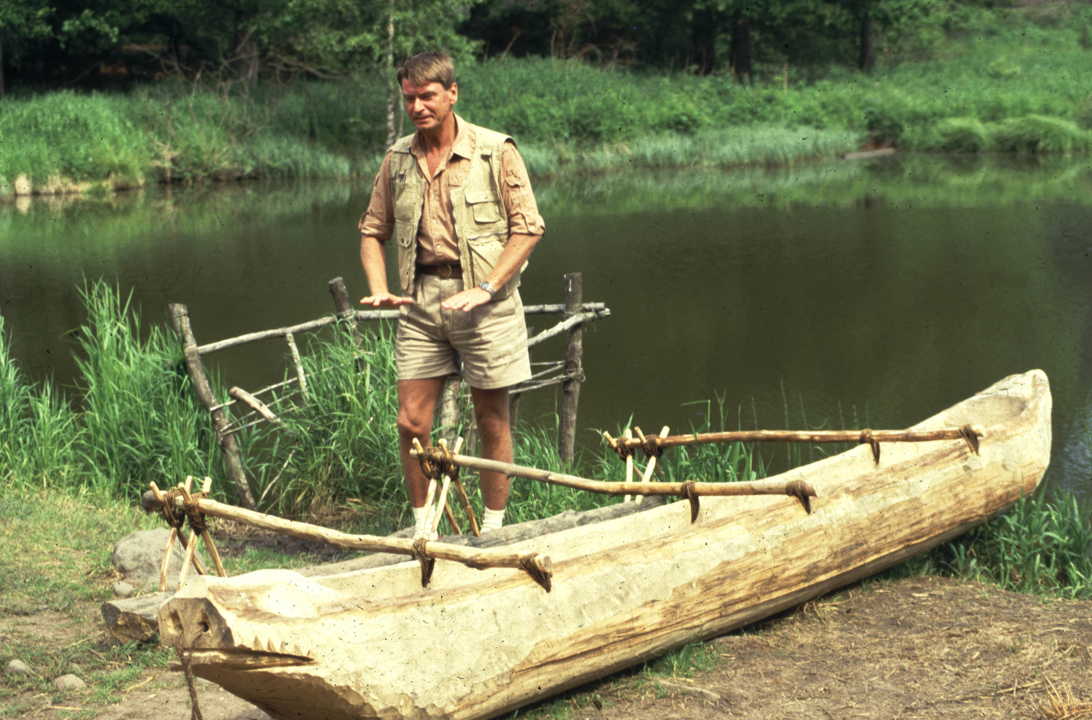 Stenåldersprojektet Forntid i Nutid i Skånes djurpark, Sverige